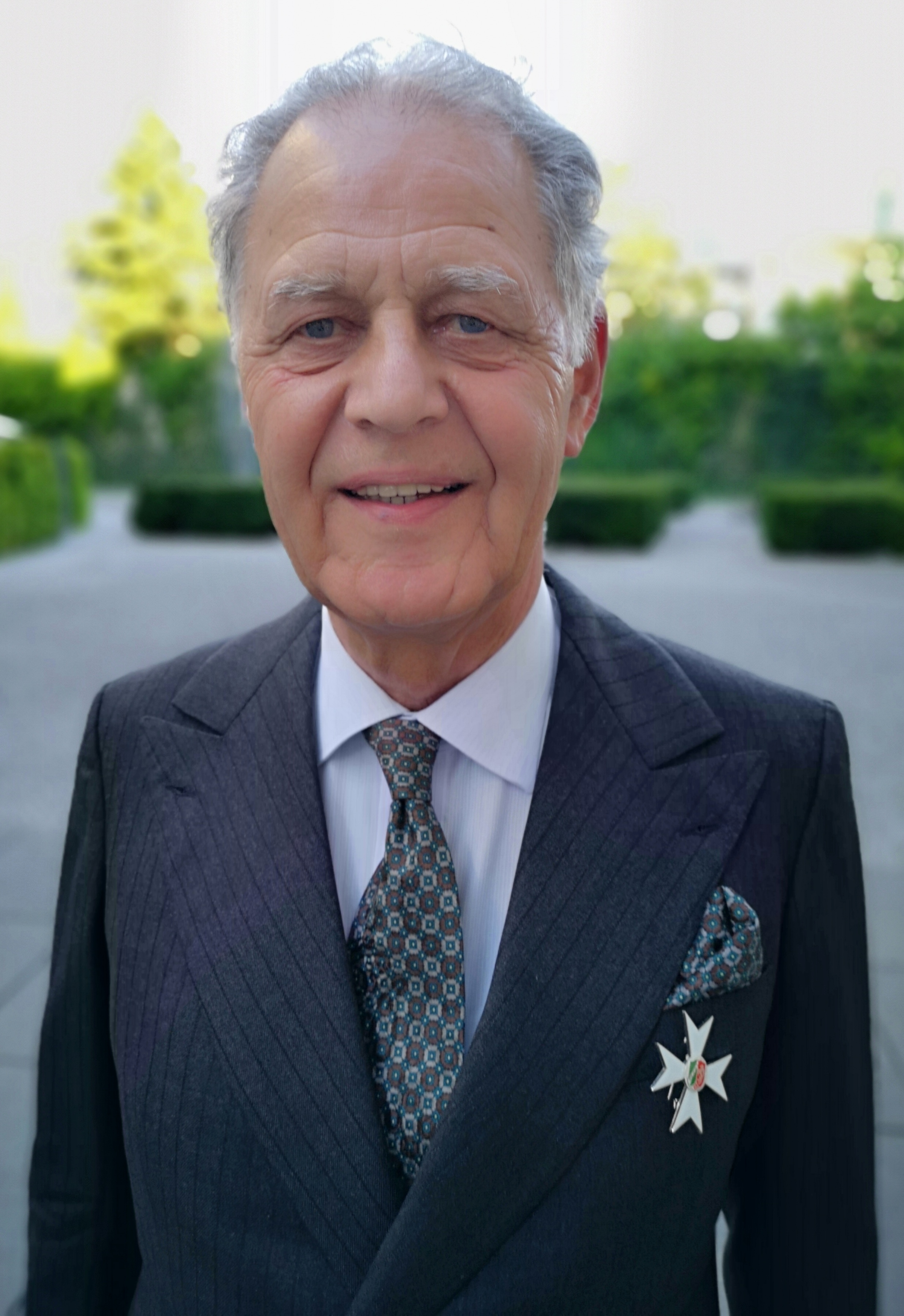 Hubertus Freiherr von Fürstenberg (2018), Verleihung des Verdienstordens des Landes Nordrhein-Westfalen 2018